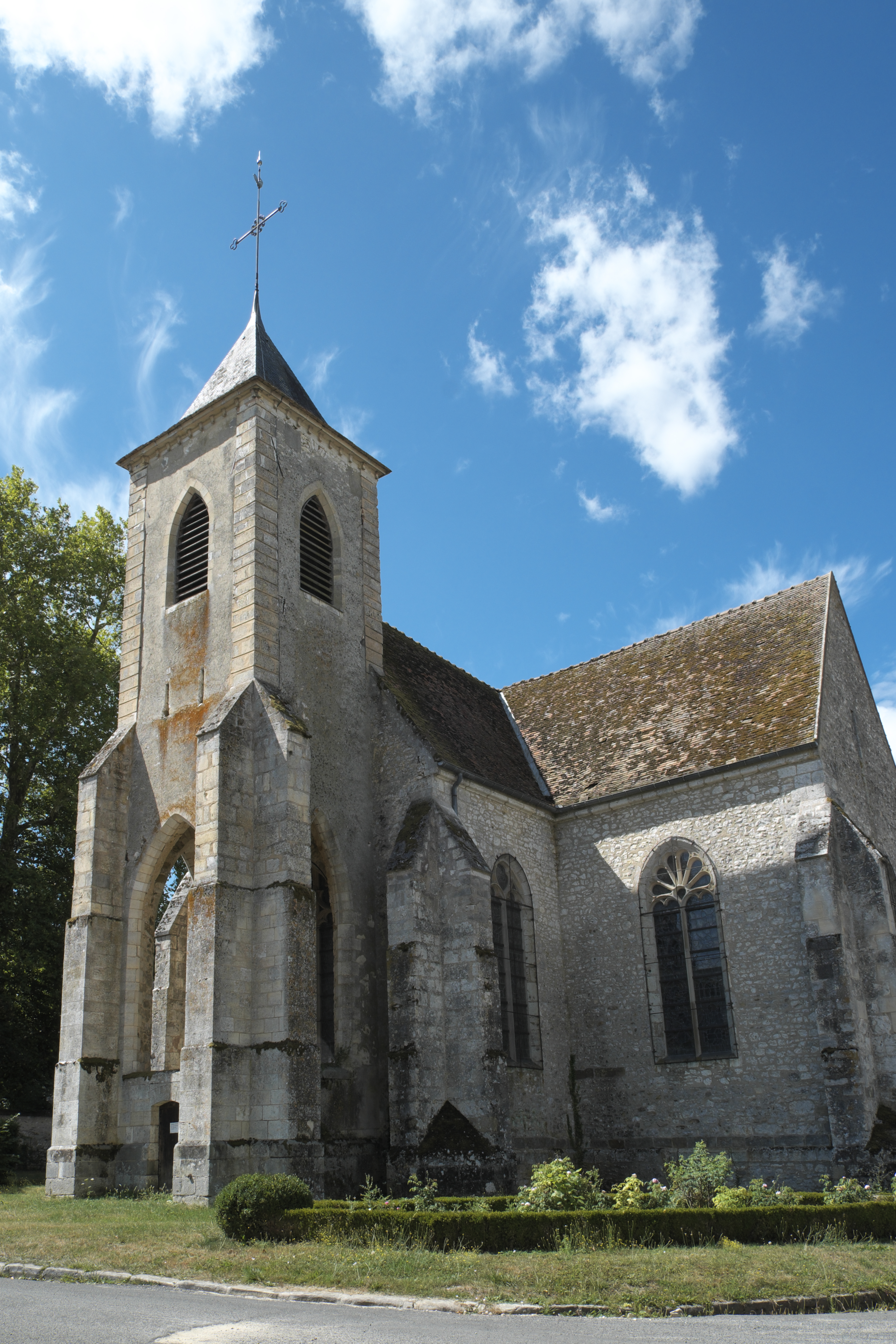 Kirche Sainte-Osmanne in Féricy im Département Seine-et-Marne (Île-de-France/Frankreich)